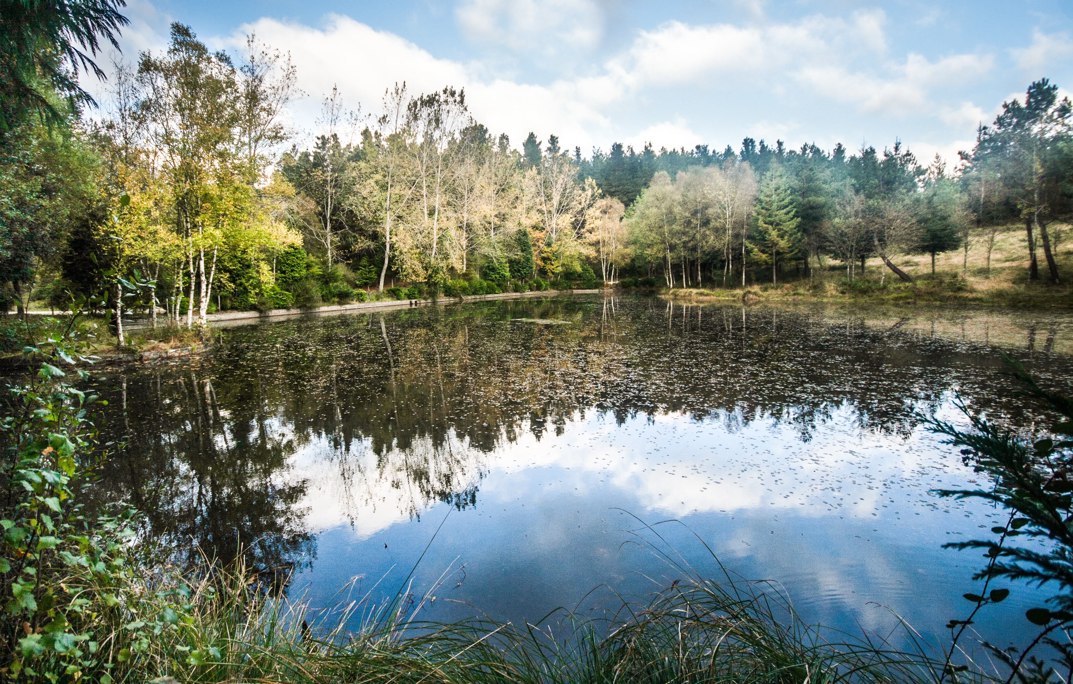 Lagos de Teixeiro (Lugo).